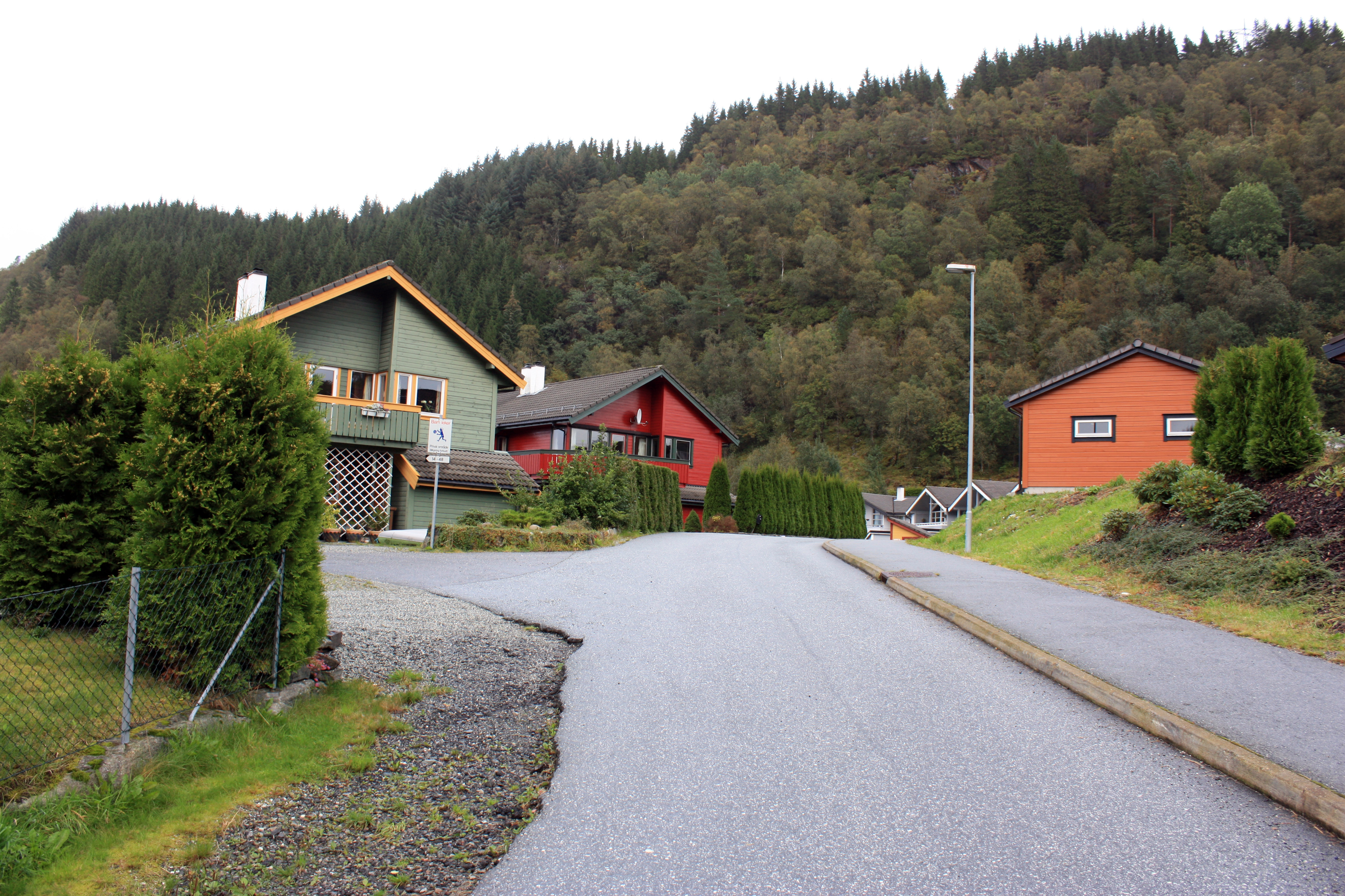 Øvre Kirkebirkeland, Fana, Bergen.